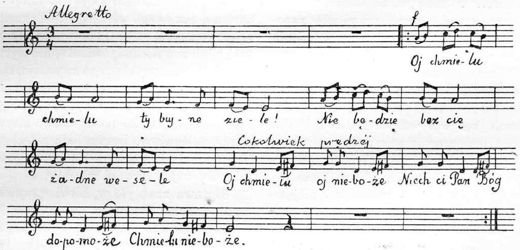 Ilustracja do Encyklopedii staropolskiej T.3 283 - Melodia starozytnej pieśni o chmielu